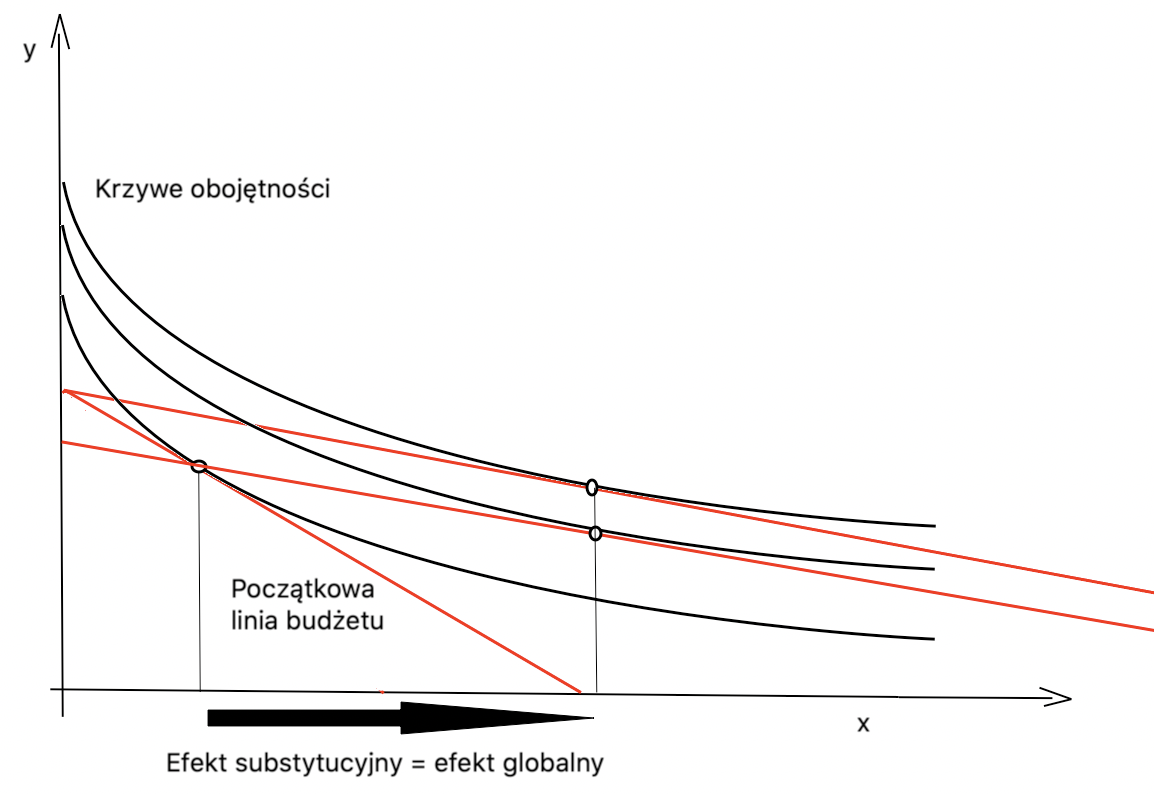 Wykres przedstawiający efekt substytucyjny w przypadku pref. quasi-liniowe